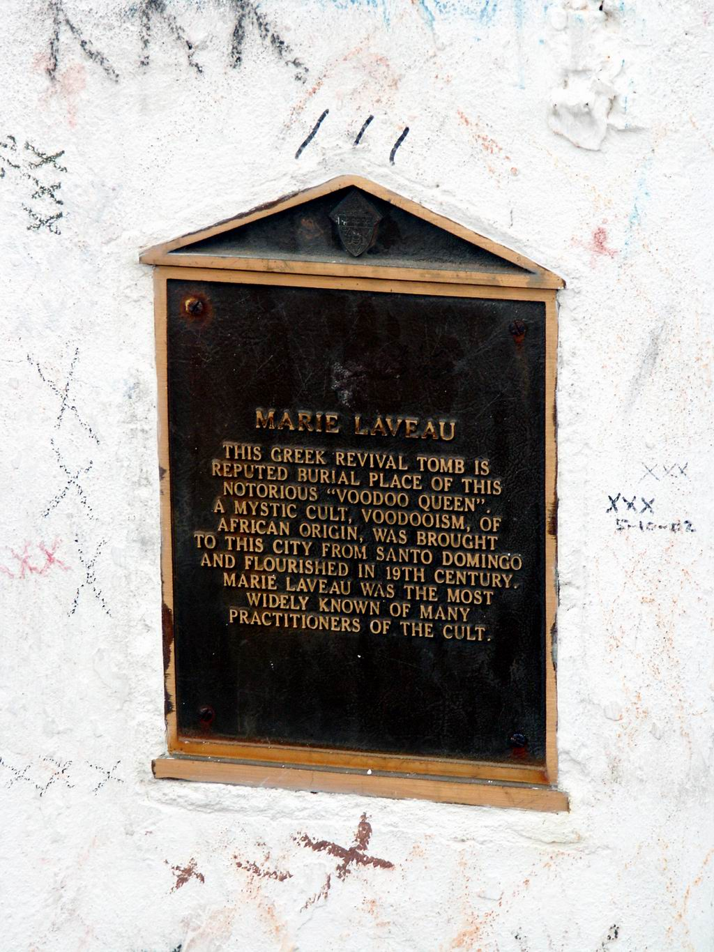 Grab von Voodoo-Queen Marie Laveau auf dem St. Louis Cemetery, New Orleans